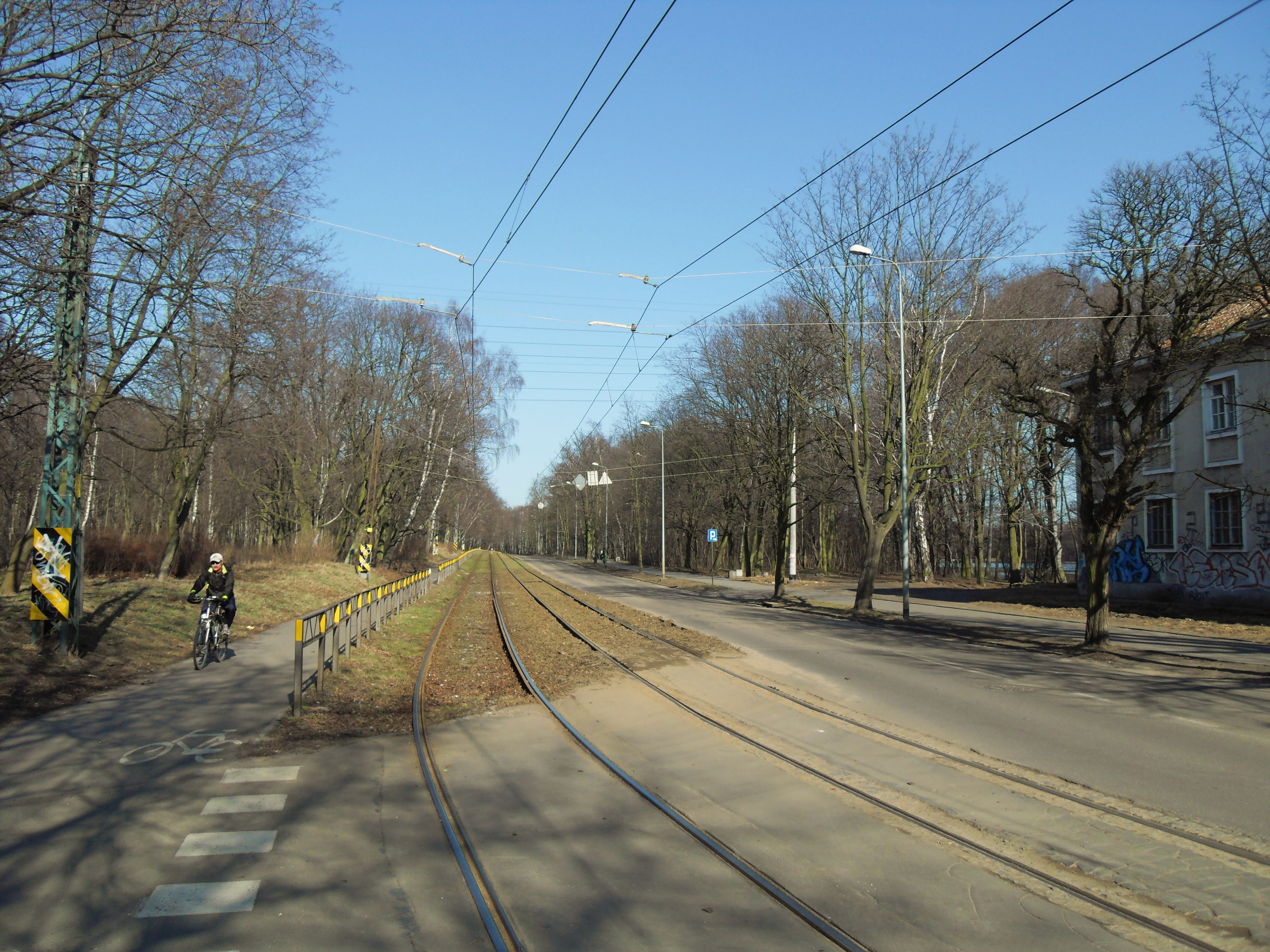 Gdańsk Stogi, ul. Nowotna.